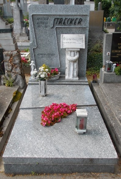 Grab Heinrich Strecker-Helenenfriedhof Baden